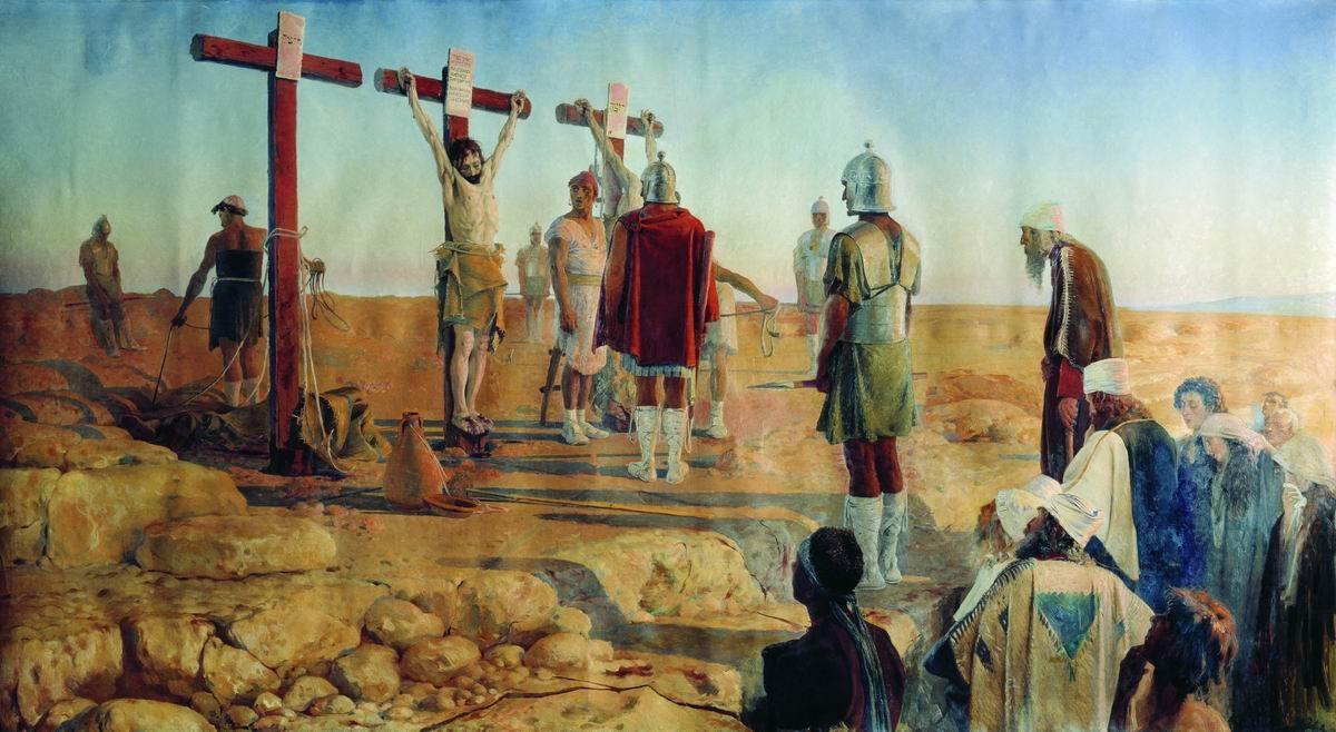 Голгофа (Снятие с креста). 1890. Холст, масло. 240x429 см. Государственная Третьяковская галерея, Москва